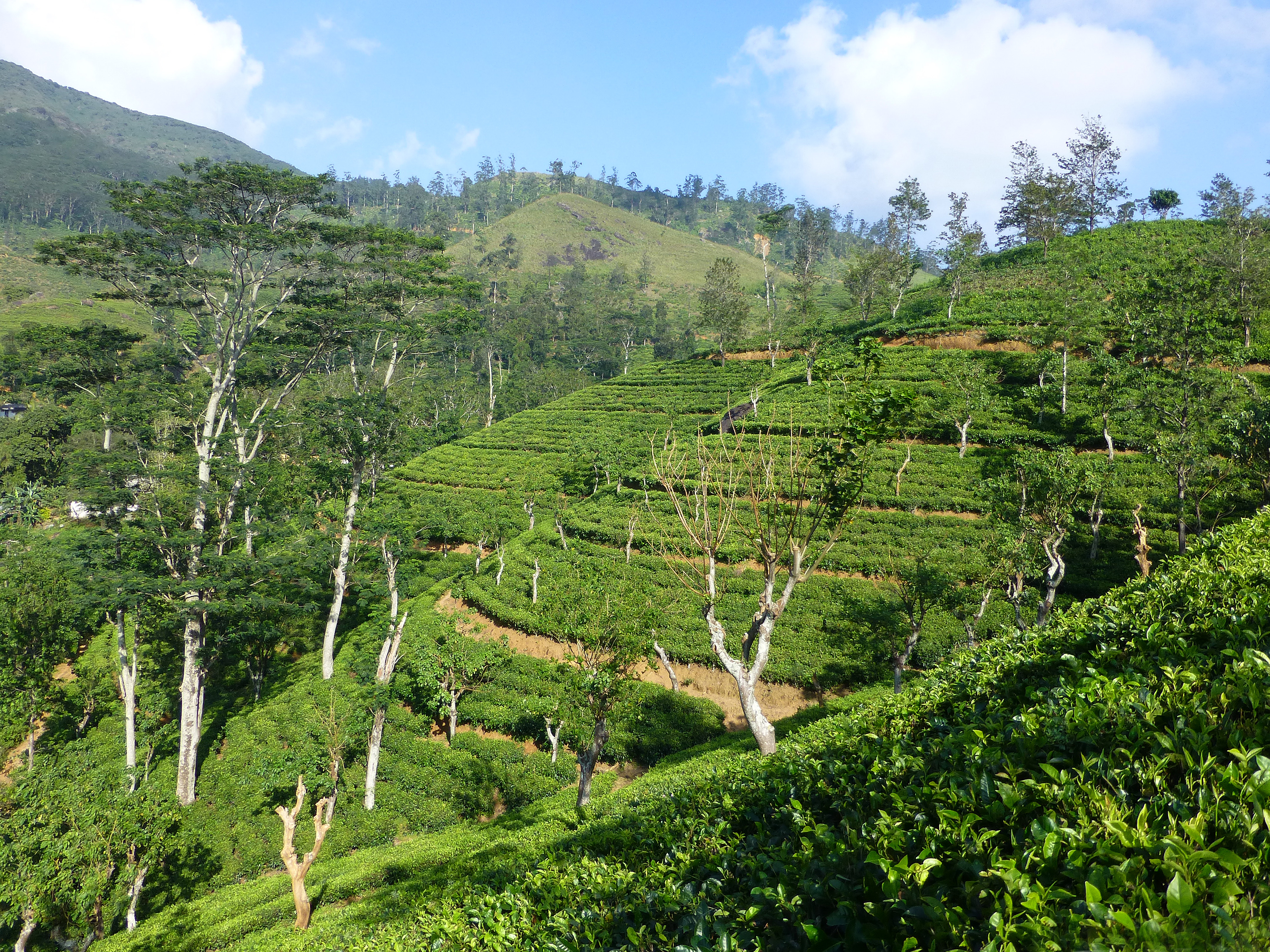 Plantations de thé au Sri Lanka (Province du Centre)